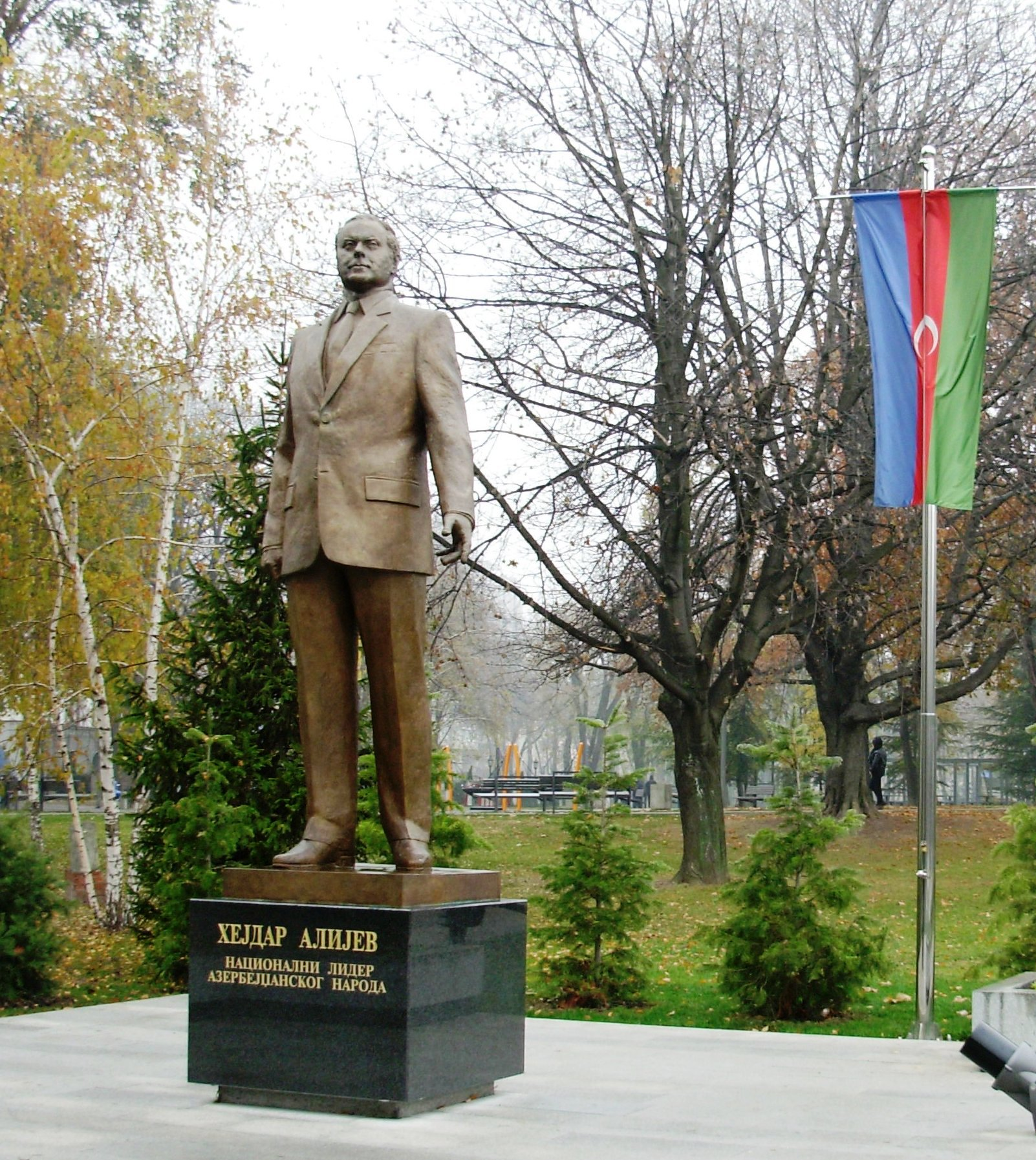 Spomenik Hajdaru Alijevu u parku Tašmajdan, Beograd. Slikao Goldfinger.